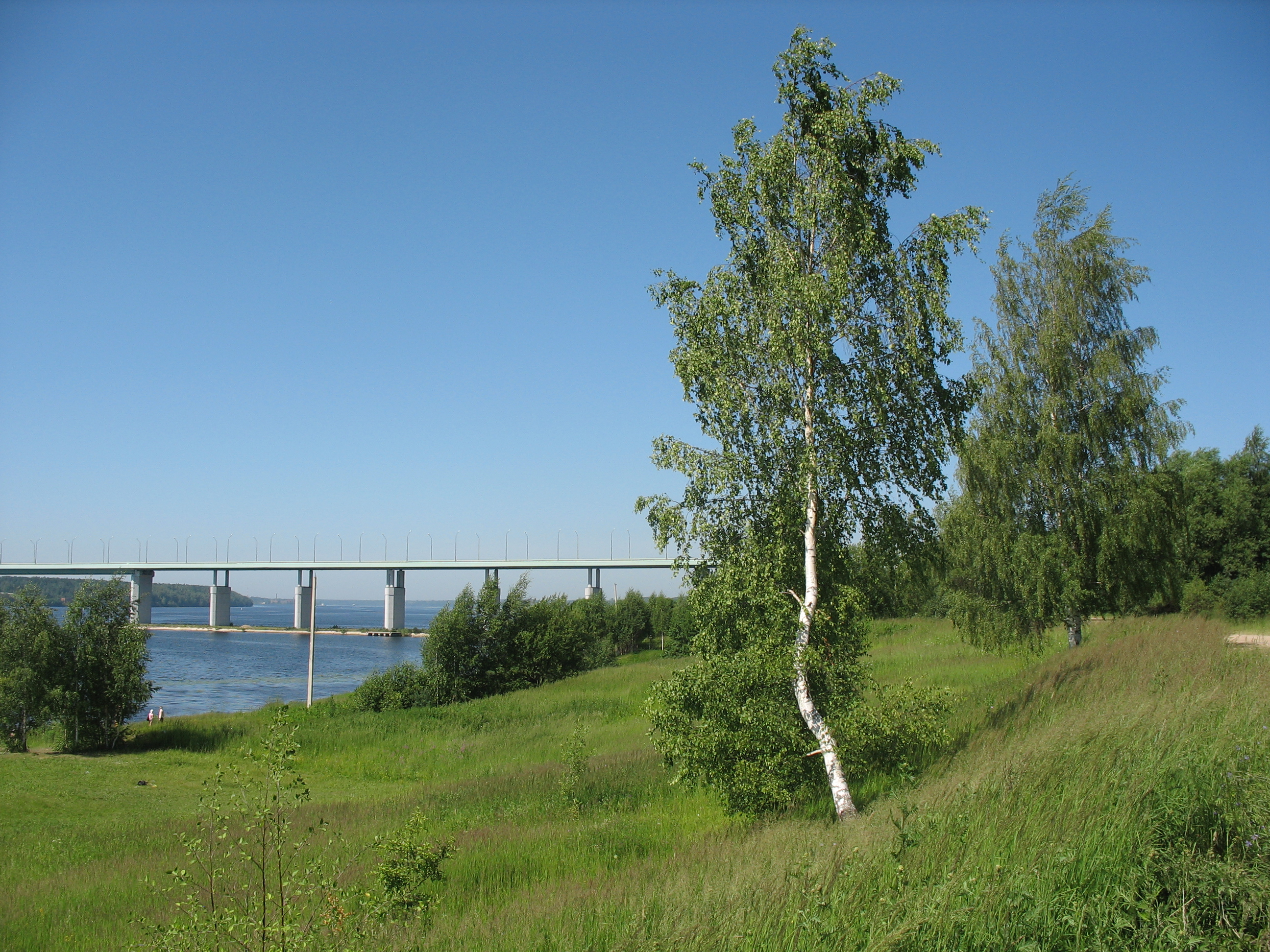 У реки